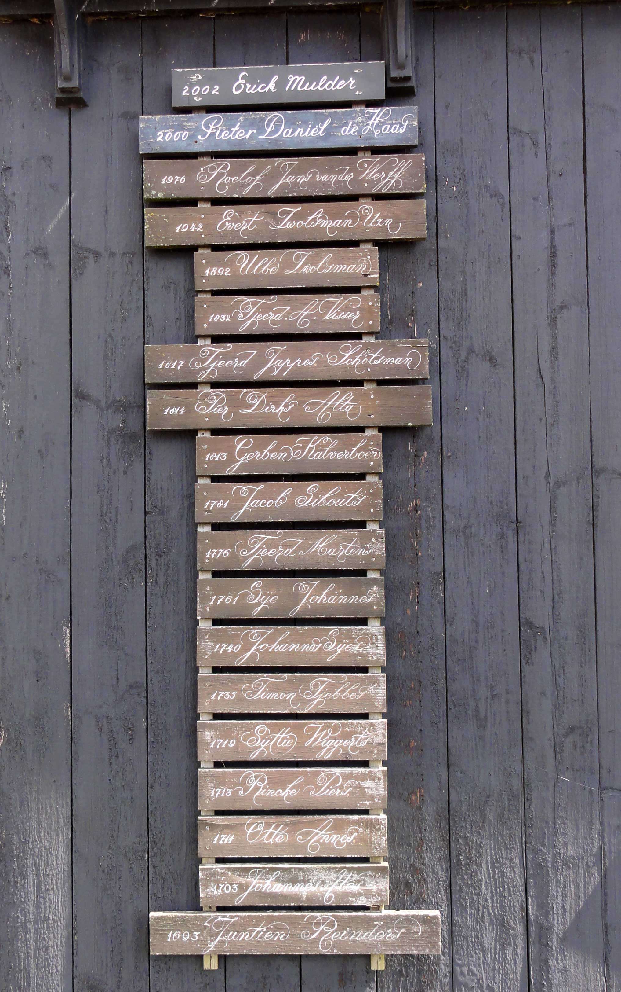 Scheepstimmerwerf De Hoop Séburch 5 Workum